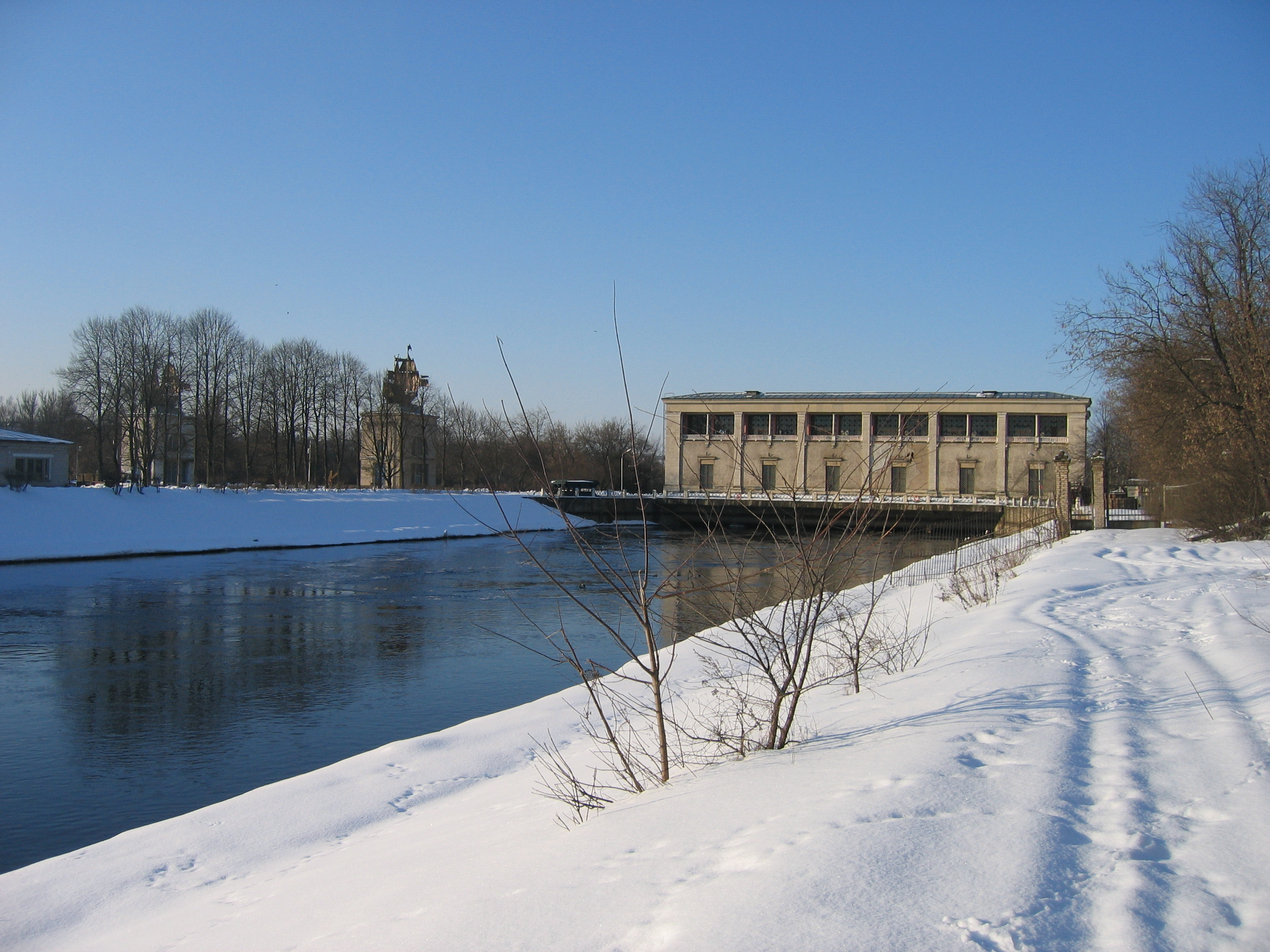 Technische Bauwerke mit Schleuse am Moskau-Wolga-Kanal in Jachroma, Russland